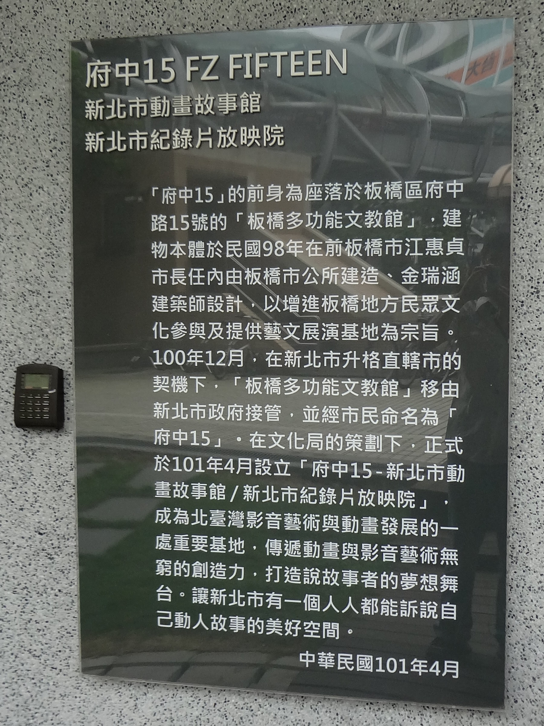 府中15歷史解說牌，位於府中15一樓外牆，2012年（中華民國101年）4月製。